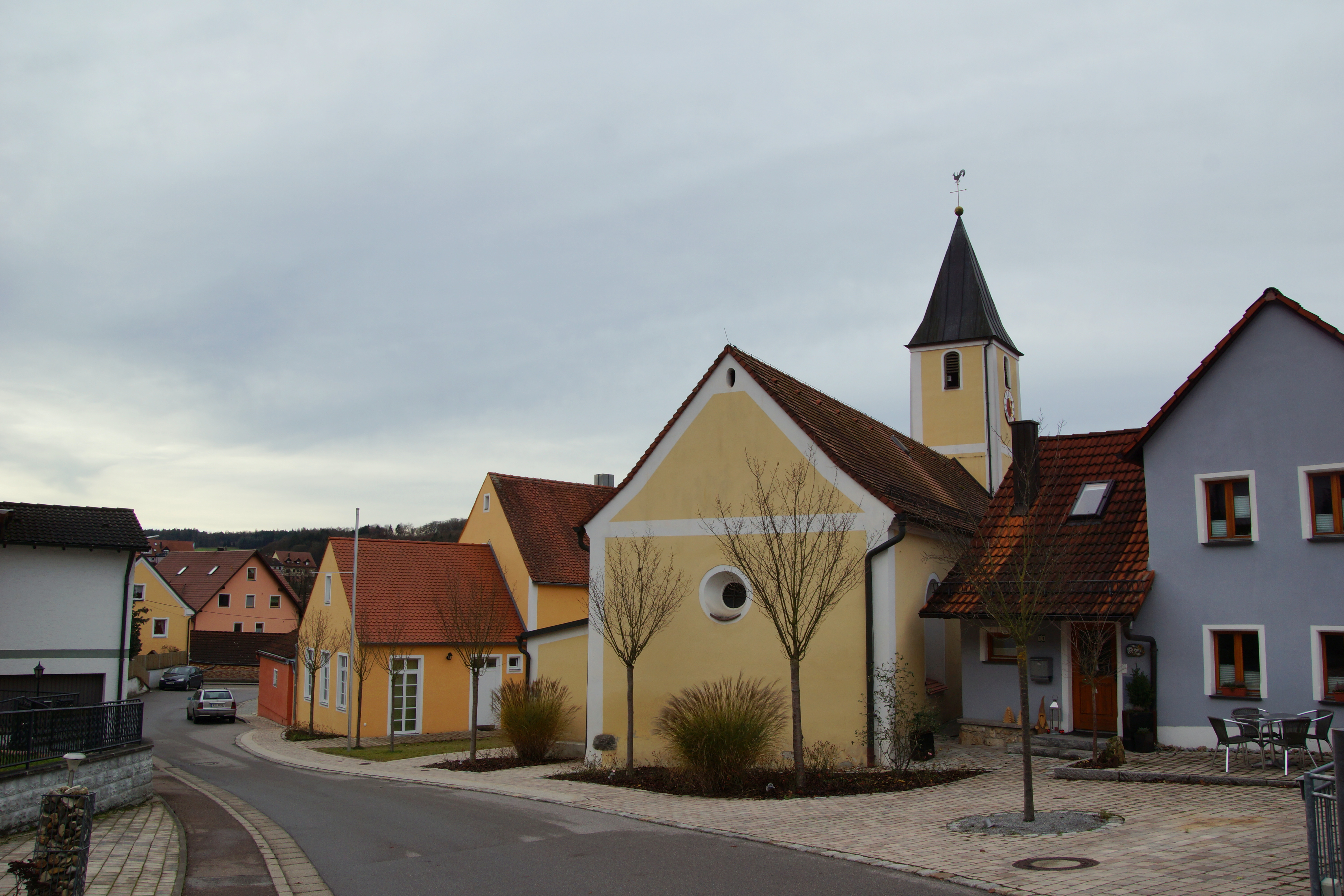 Die Filialkirche St. Johannes in Schönhofen im Landkreis Regensburg